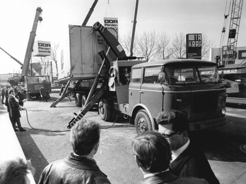 Leipzig, Frühjahrsmesse, Freigelände, Sattelauflieger, Container Zentralbild Sindermann 15.3.71 Leipziger Frühjahrsmesse 1971- Zu den Exponaten der VVB TAKRAF vor der Halle 20 gehört ein Sattelauflieger mit Kraneinrichtung für 20-Fuß-Container des VEB Fahrzeugwerke "Ernst Grube", Werdau. Die neuentwickelte hydraulische Container-Hubeinrichtung befindet sich auf einer Skoda-Zugmaschine 706 der CSSR-Skodawerke.